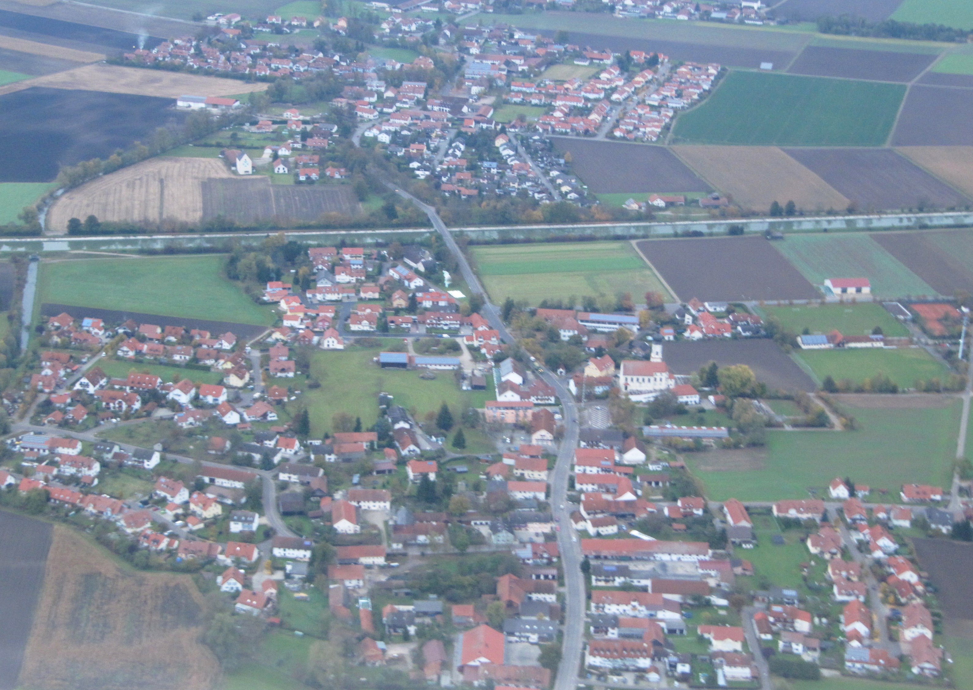 Berglern , Mitterler